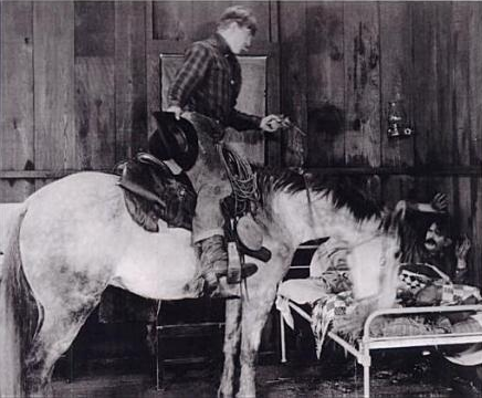 Imagen de la película de John Ford Hell Bent en la que Cheyenne Harry (Harry Carey) convence a Cimarron Bill (Duke Lee) a compartir la habitación con su caballo y él.